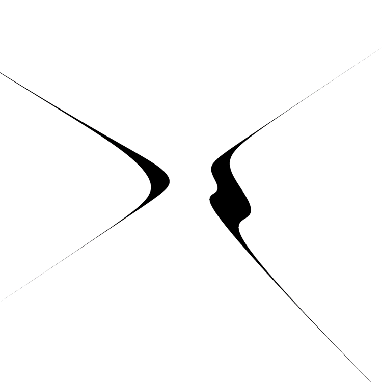 Grafika matematyczna przedstawiająca zbiór trzech nierówności. Autor: Lech Nowicki